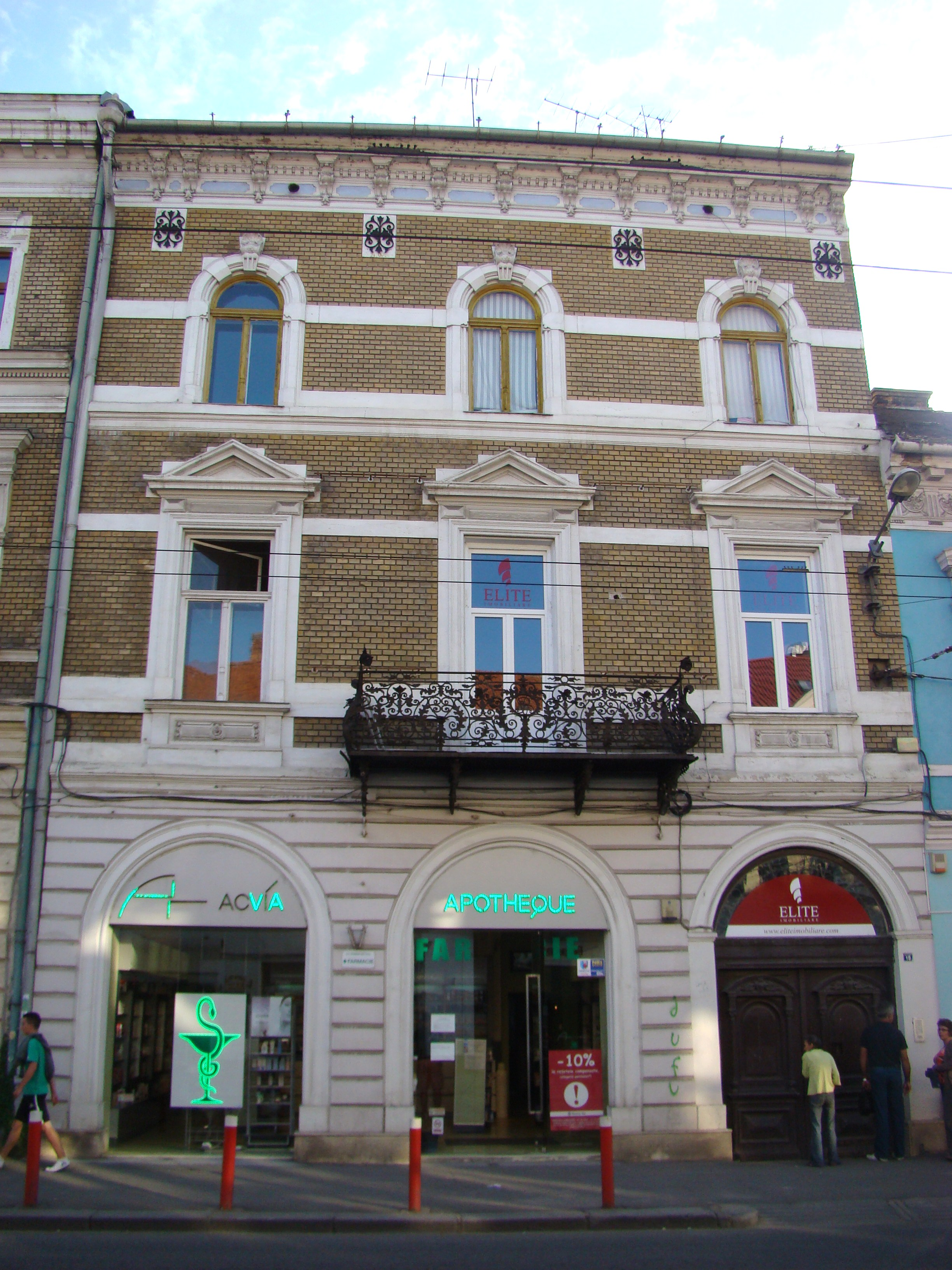 Clădire monument istoric, str.Regele Ferdinand nr.19